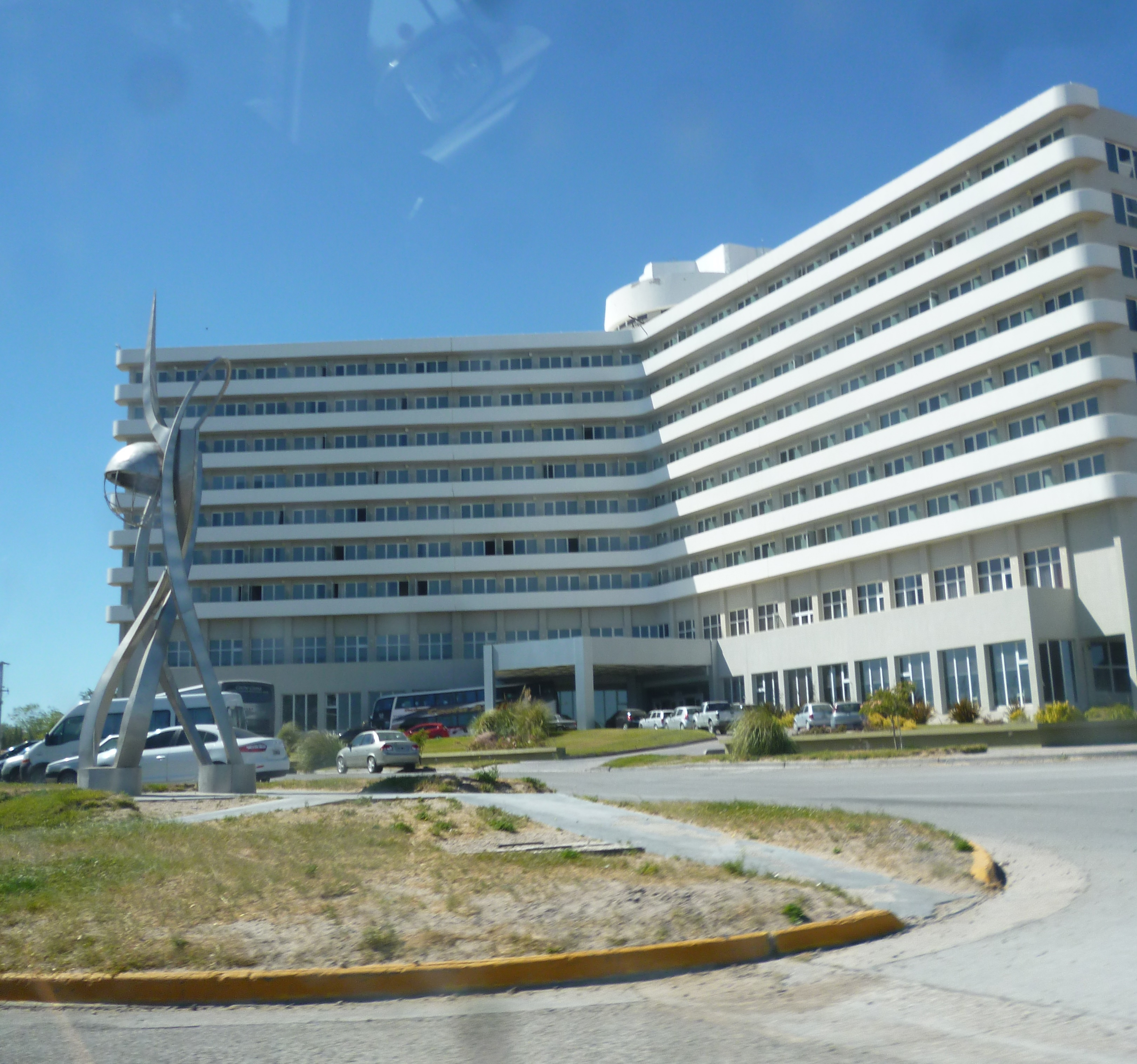 Rayentray Puerto Madryn Hotel